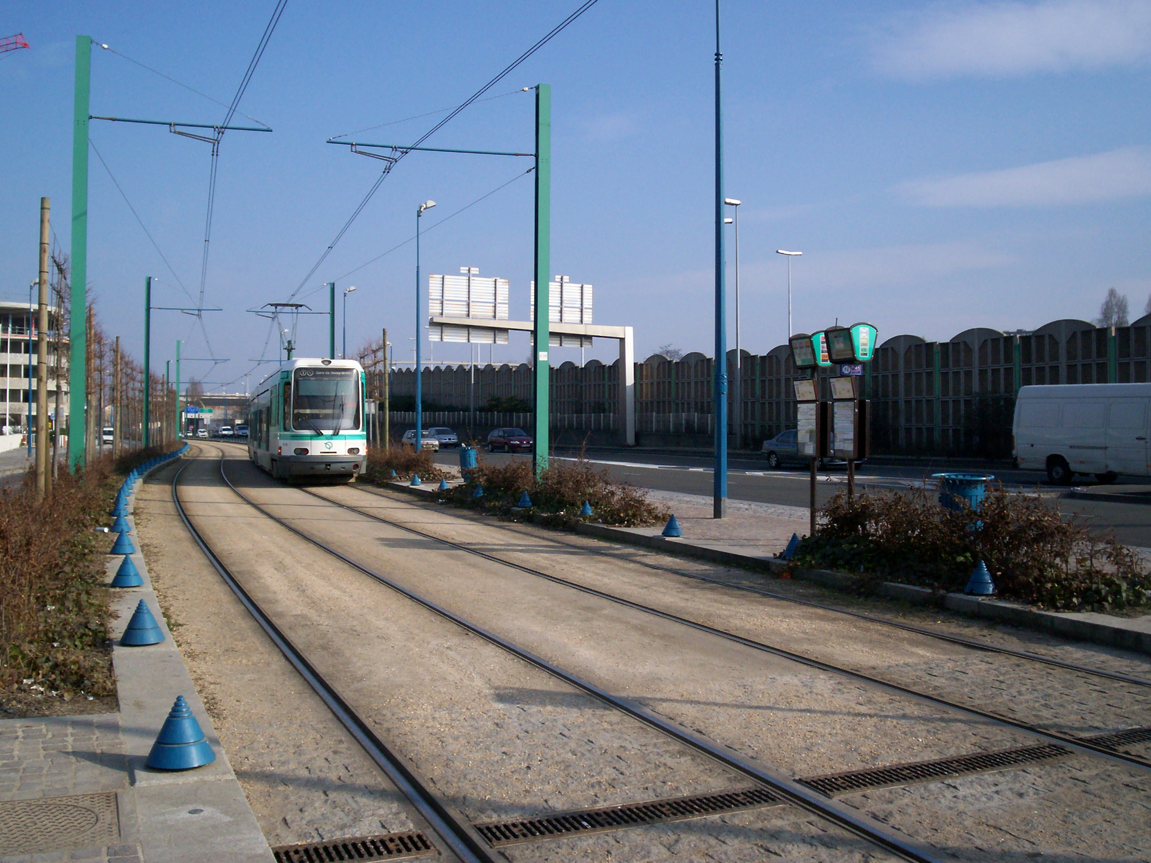 T1 à Jean Rostand